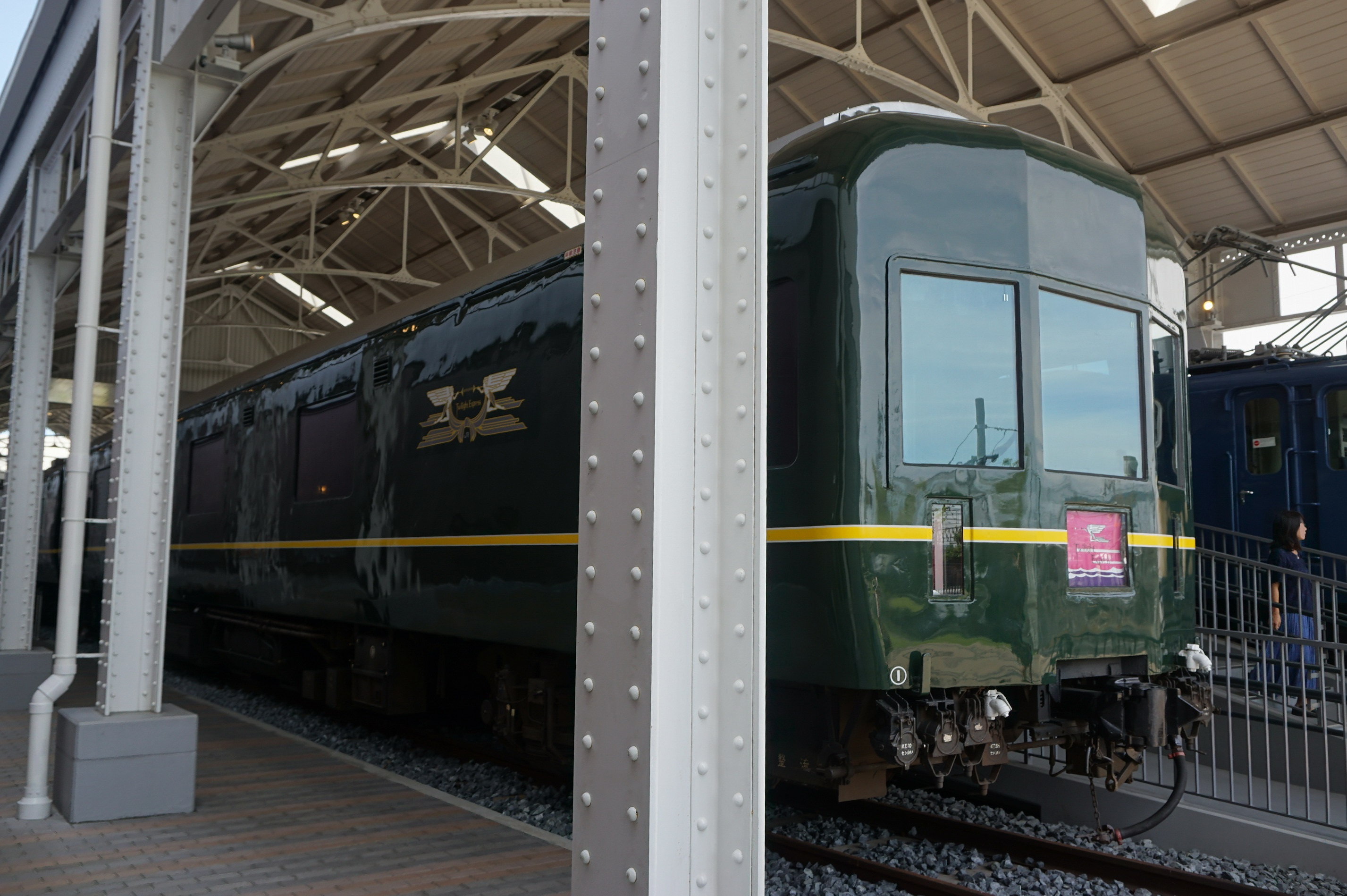 京都鉄道博物館に保存されたトワイライトエクスプレスの車両